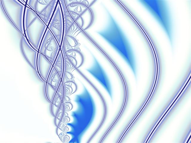 Fractal Art